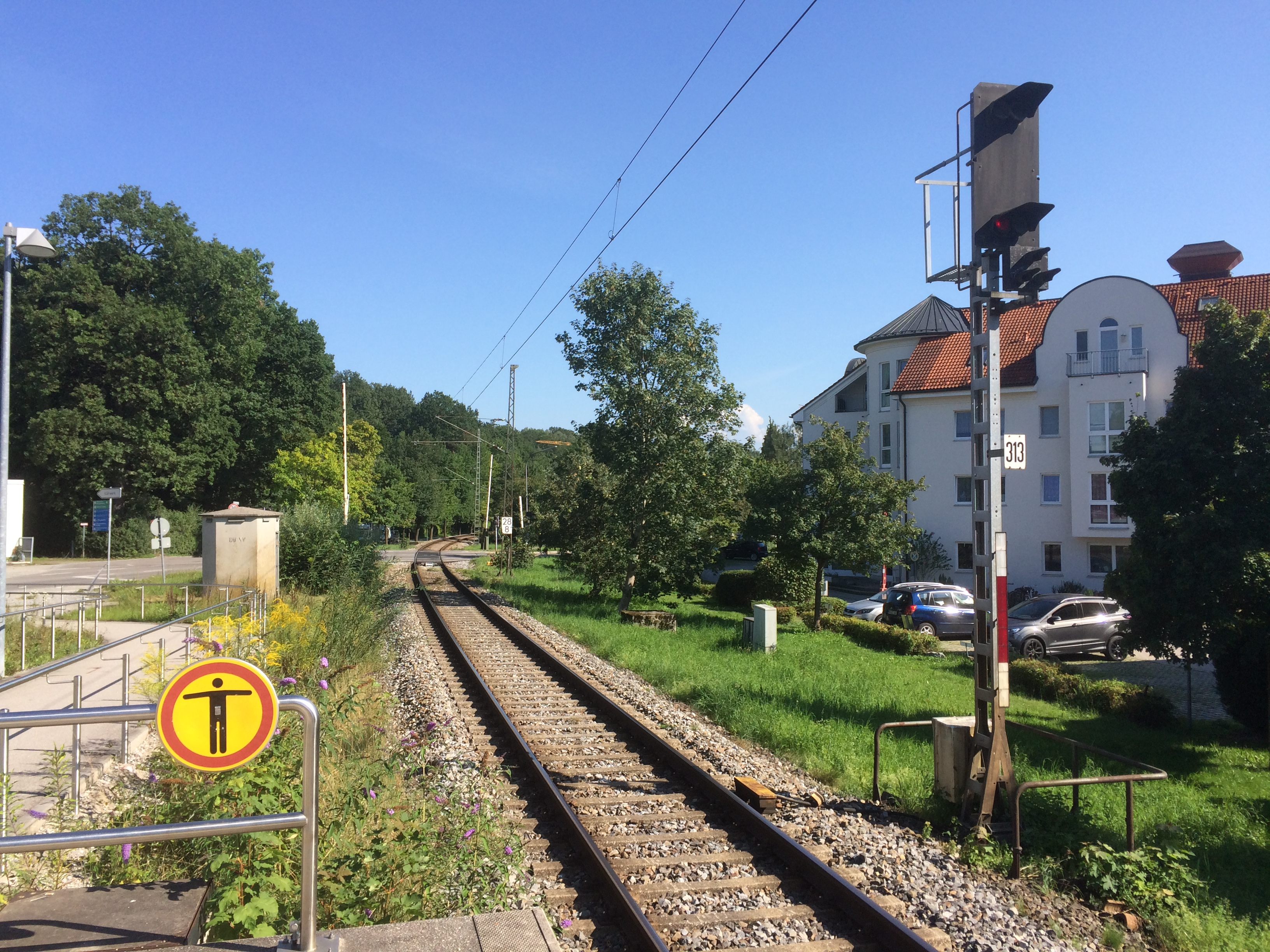 Am Zentralblocksignal 313 wurde zum zweiten Mal das Signal Zs 1 - Ersatzsignal bedient.